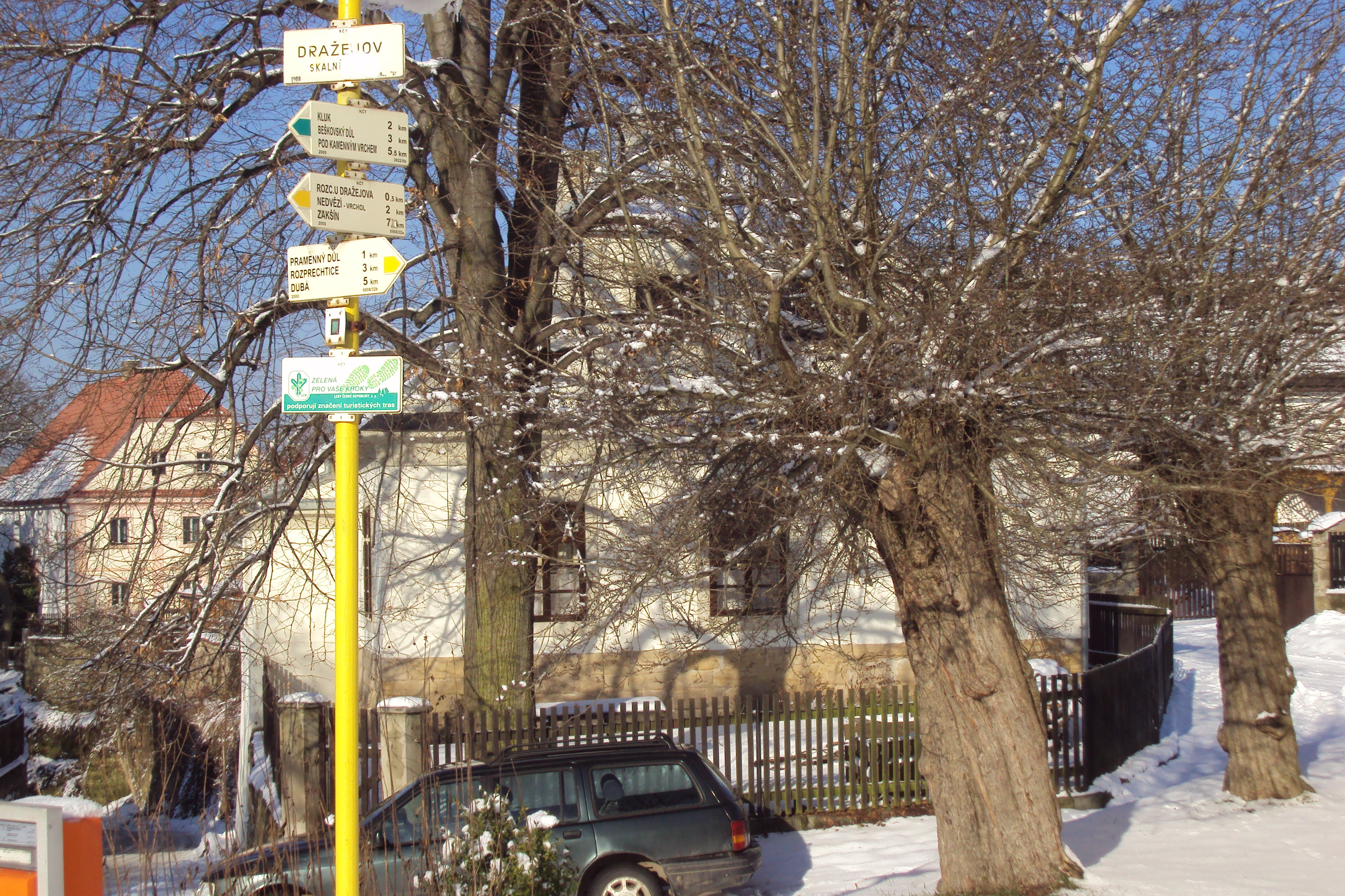 Rozcestník u kaple ve středu Dražejova